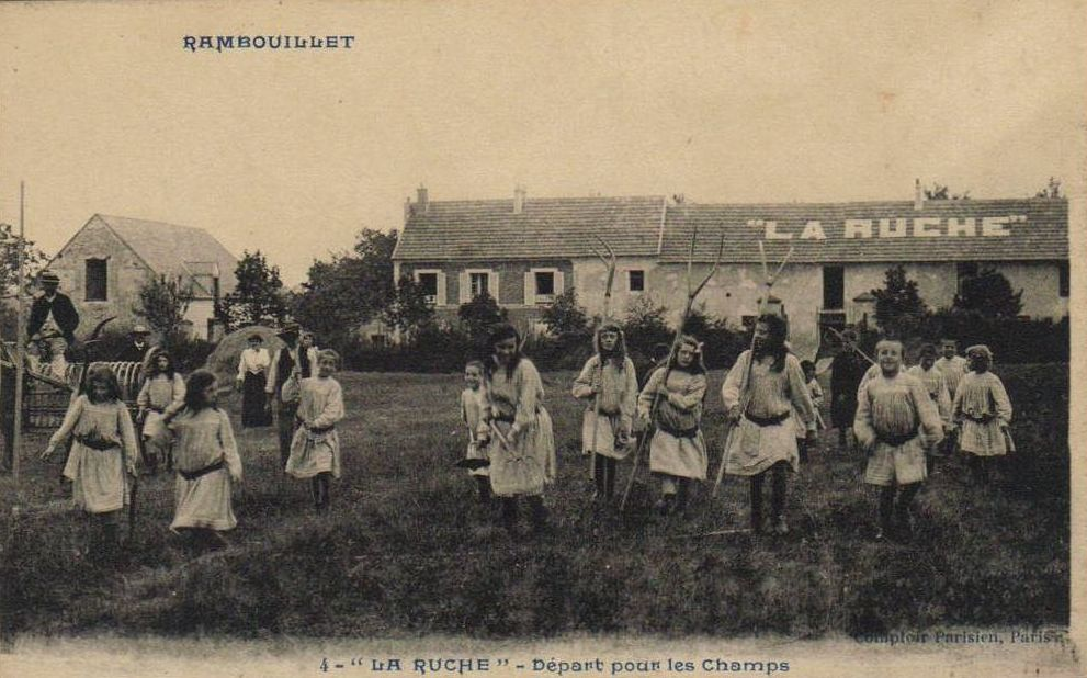 carte postale éditée par l'imprimerie de la Ruche- Rambouillet: garçons et filles apprennent les travaux des champs. Au fond, le bâtiment principal de la Ruche